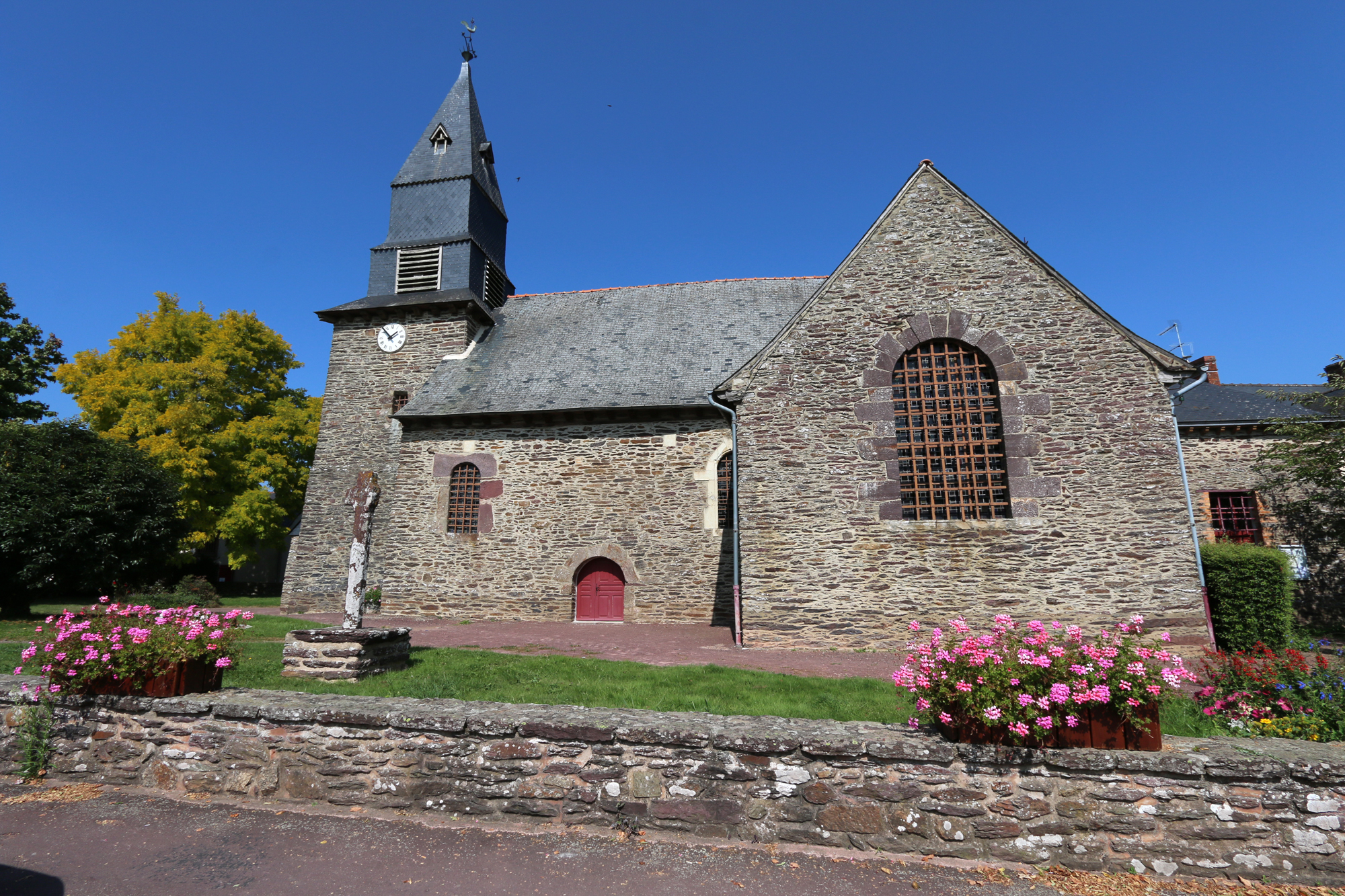 Église St-pierre du Verger